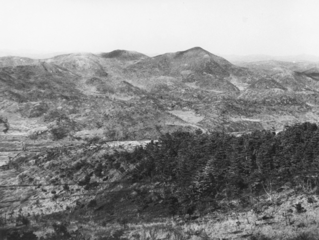 Maryang San (Hill 317) est une colline en Corée qui fut l'objet d'affrontements entre les troupes chinoises et celles des Nations-Unies pendant la guerre de Corée (bataille de Maryang San du 3 au 8 octobre 1951}